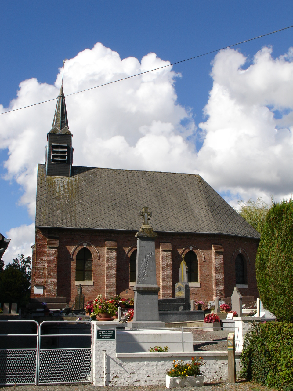 Église de Boffles